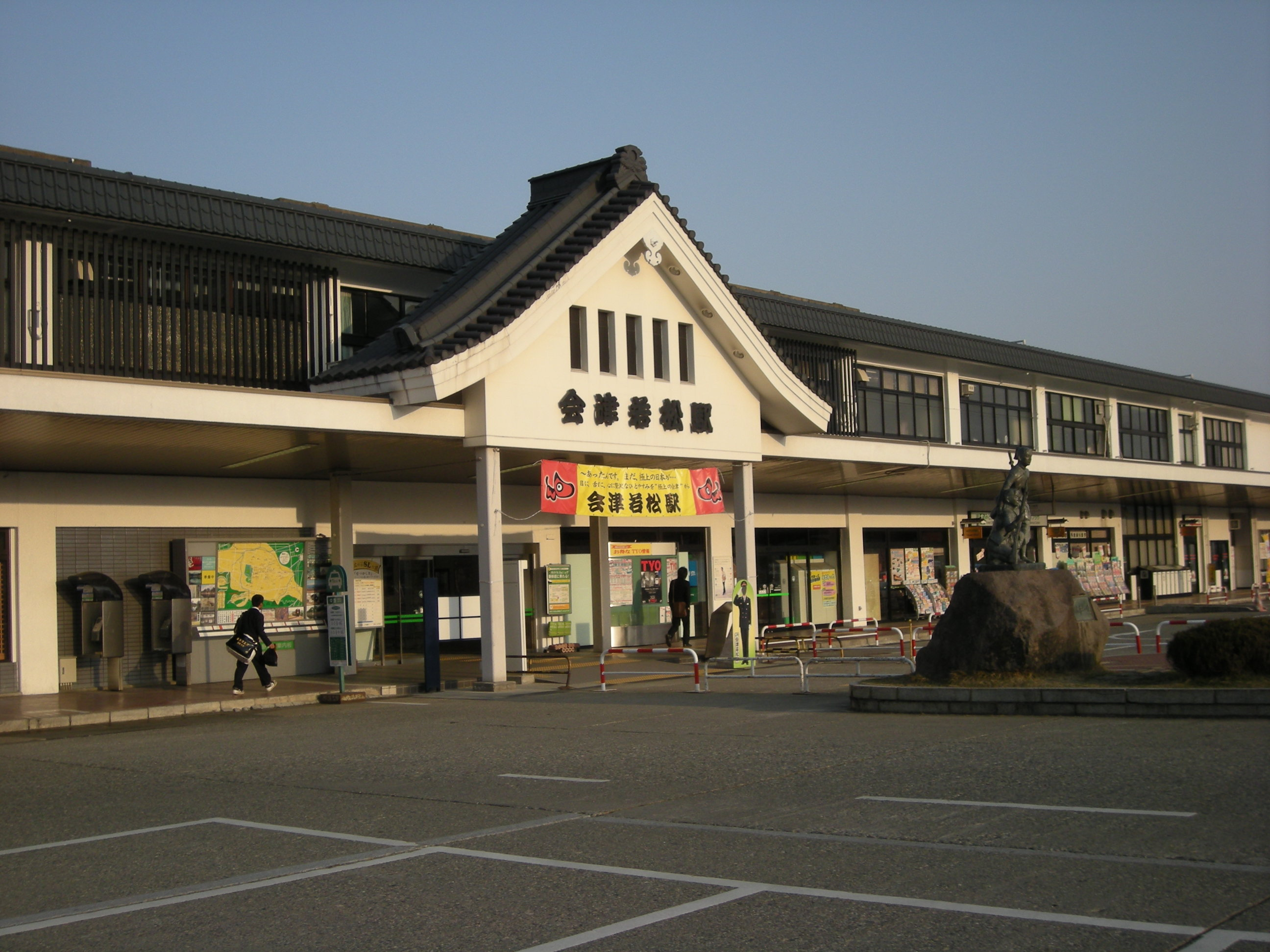 Aizu Wakamatsu Station（会津若松駅）